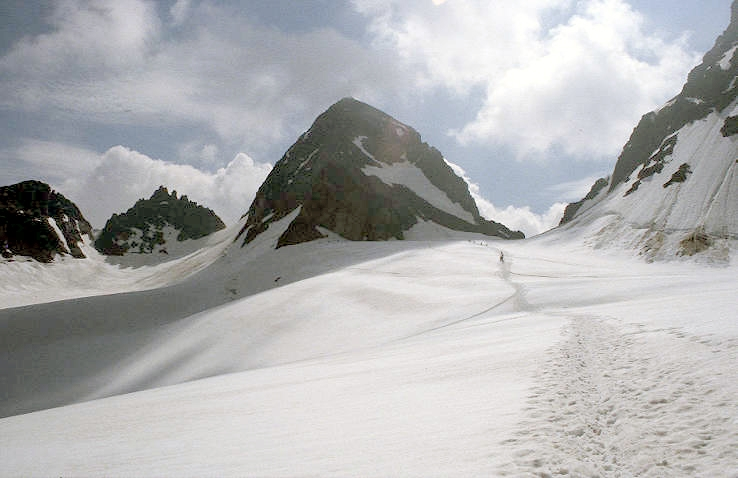 Piz Buin